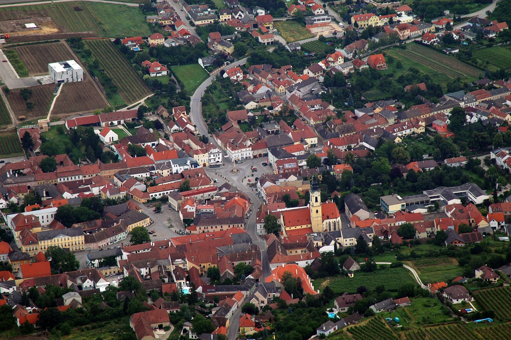 Langenlois, selbst geknipst im Juni 2004, GNU-FDL